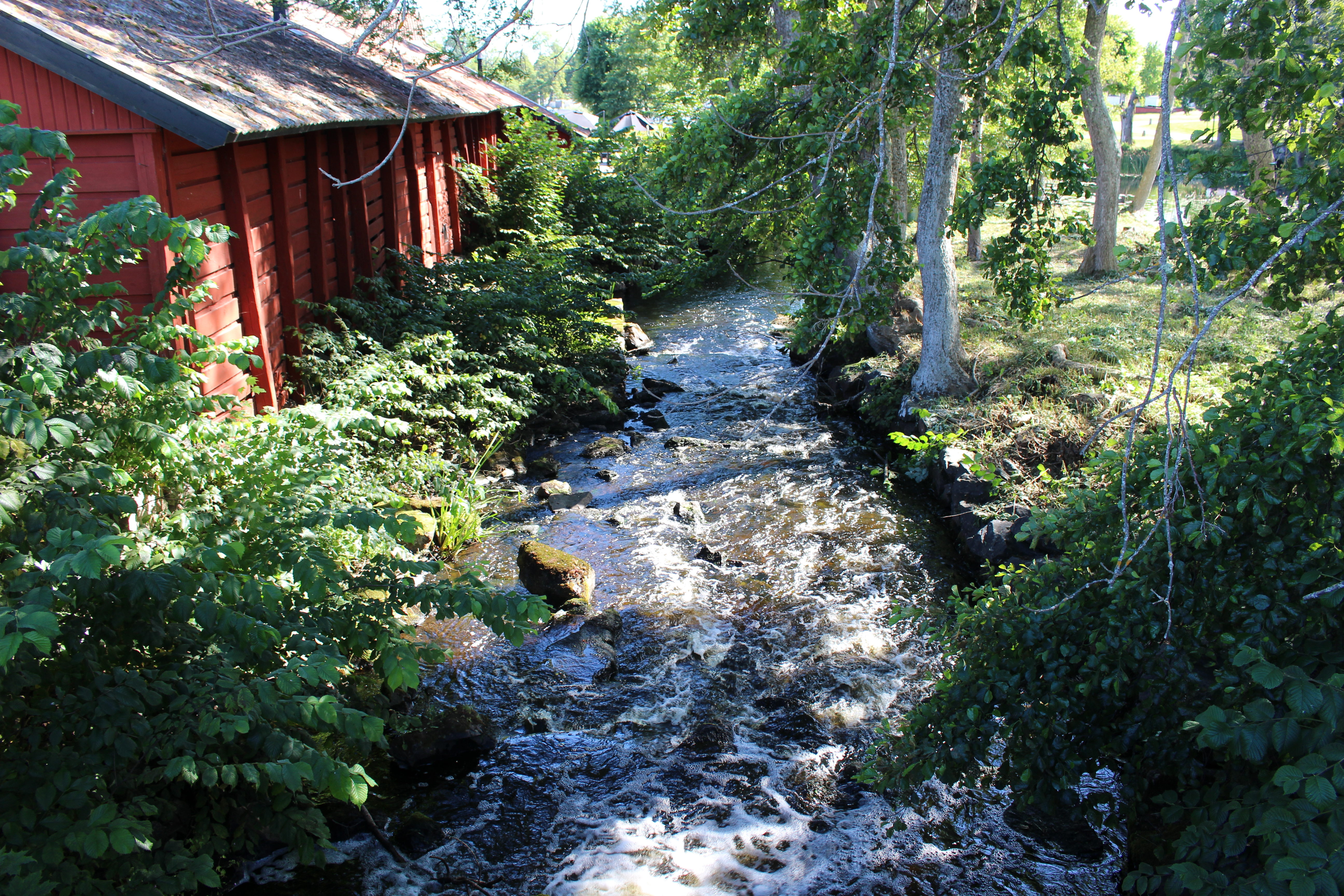 Forsmarksåns början vid Bruksdammens sydöstra del vid Forsmarks bruk.